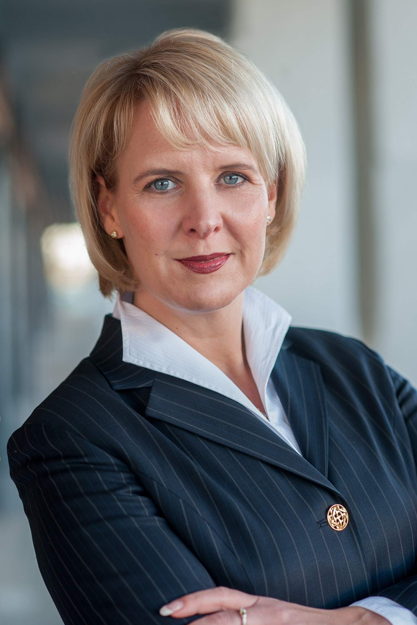 Portraitfoto